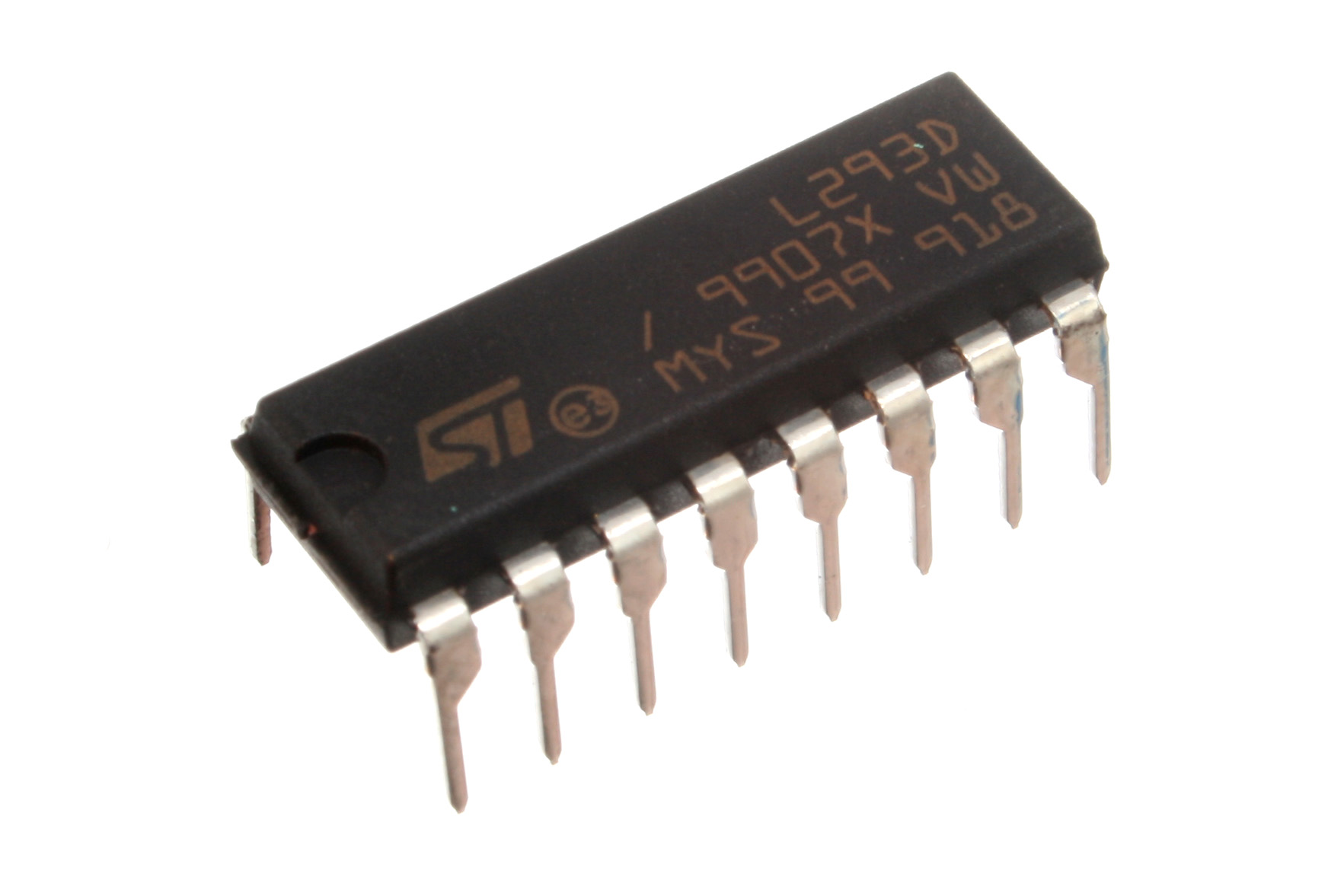 L293D Motor Driver.